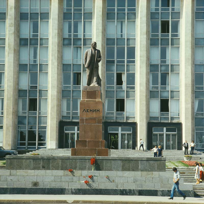 ЛЕНИН (1980).